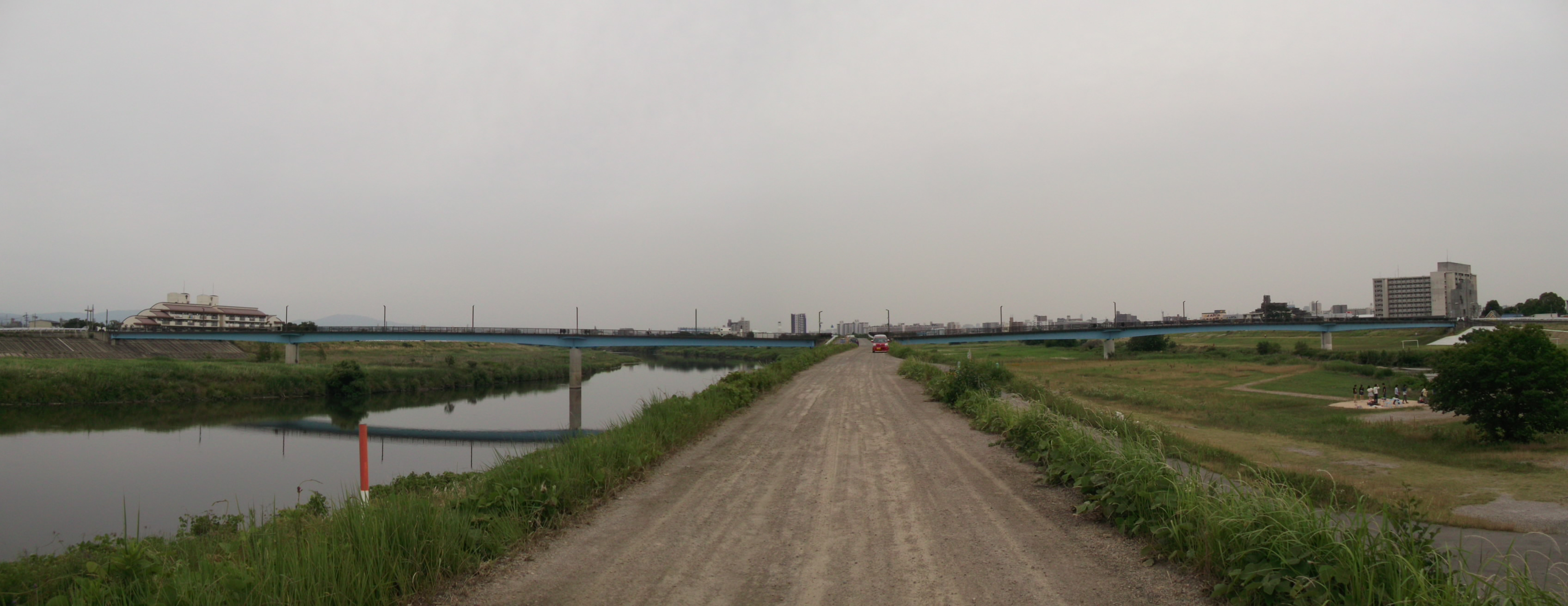 名古屋市北区の庄内川・矢田川に架かる人道橋（ふれあい橋）の全景写真。